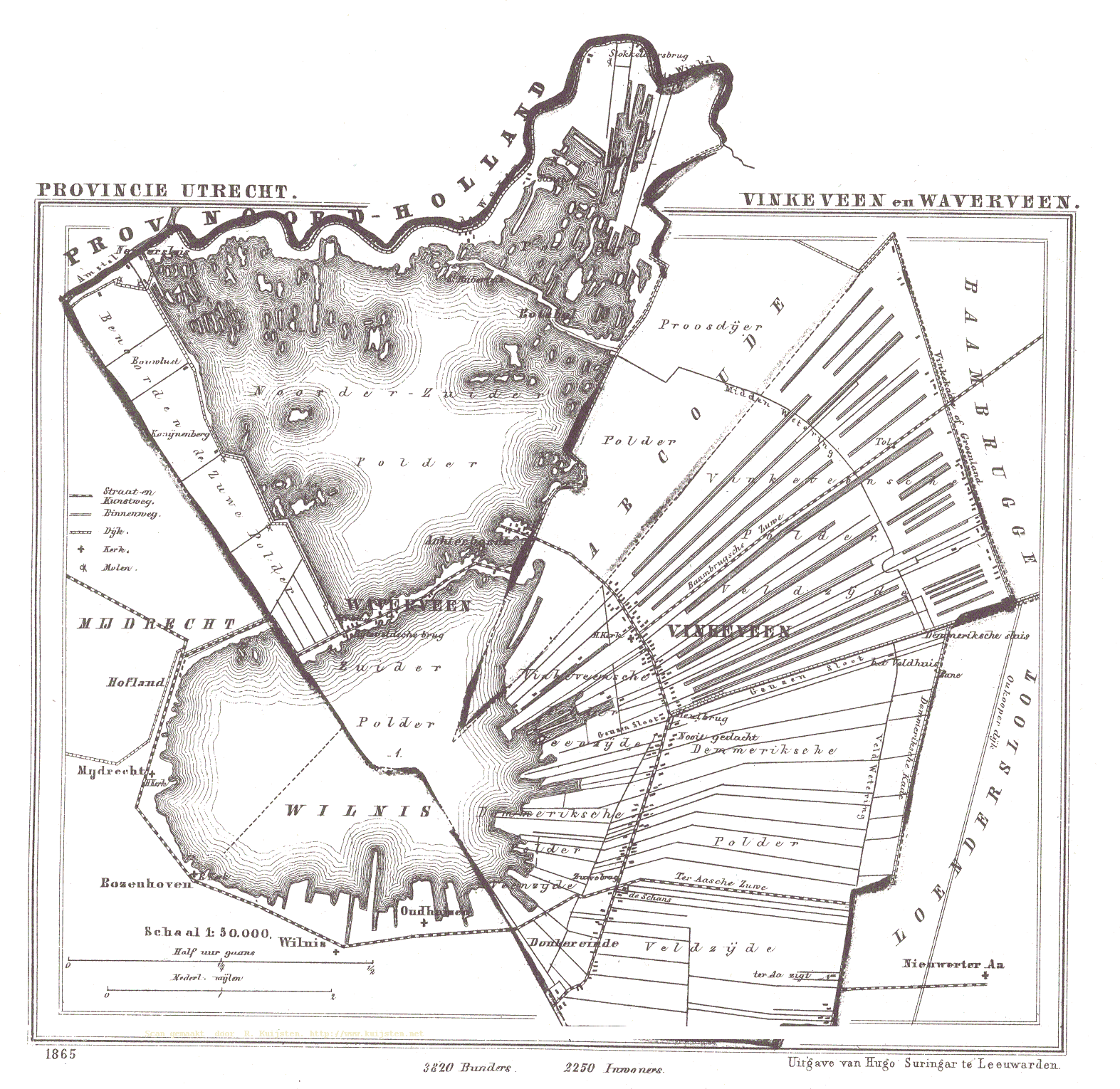 Kaart van Vinkeveen uit Gemeente Atlas van Nederland, J. Kuyper 1865-1870, Uitgave Hugo Suringar Leeuwarden.